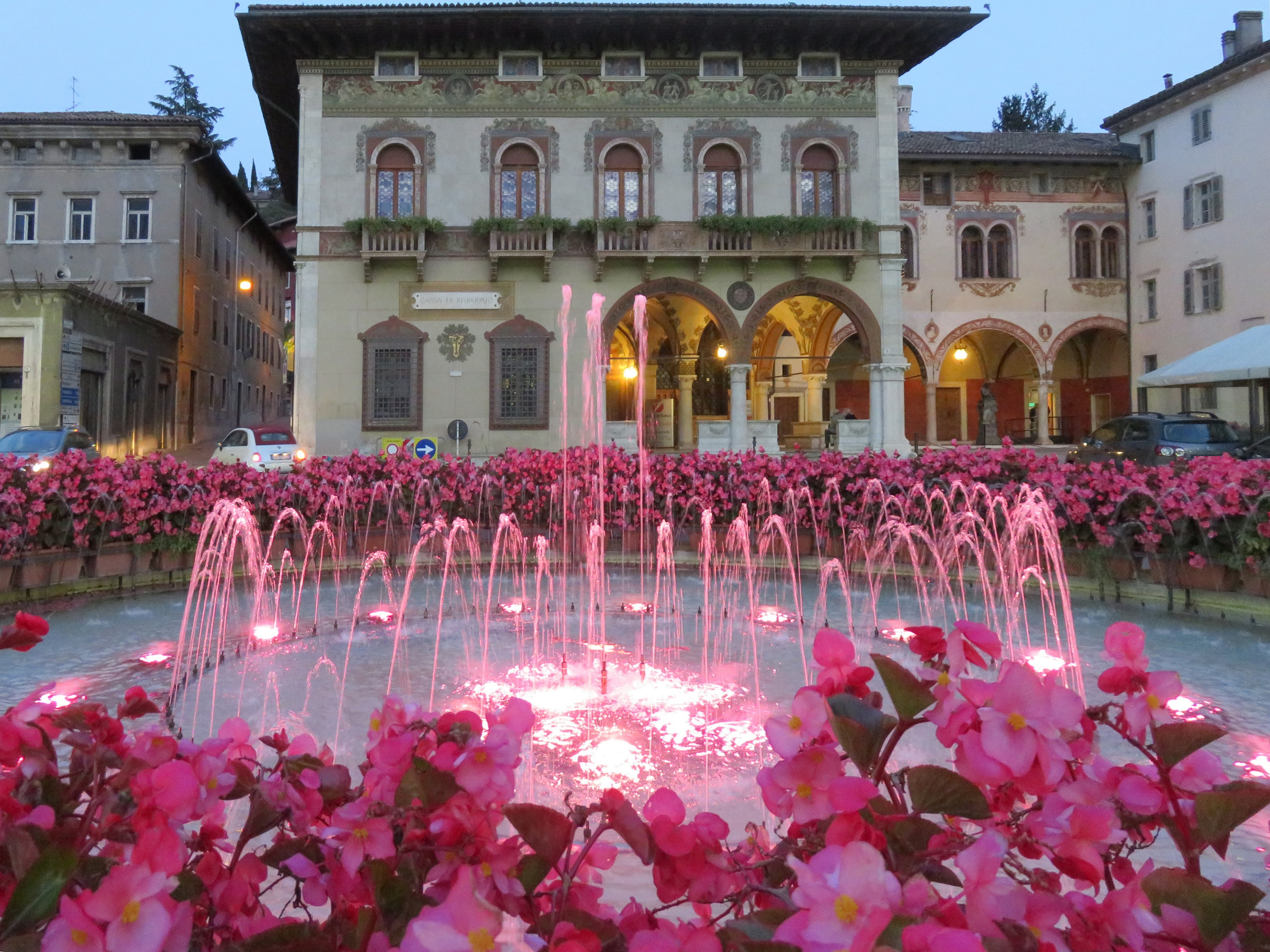 fontana con fiori ed illuninazione